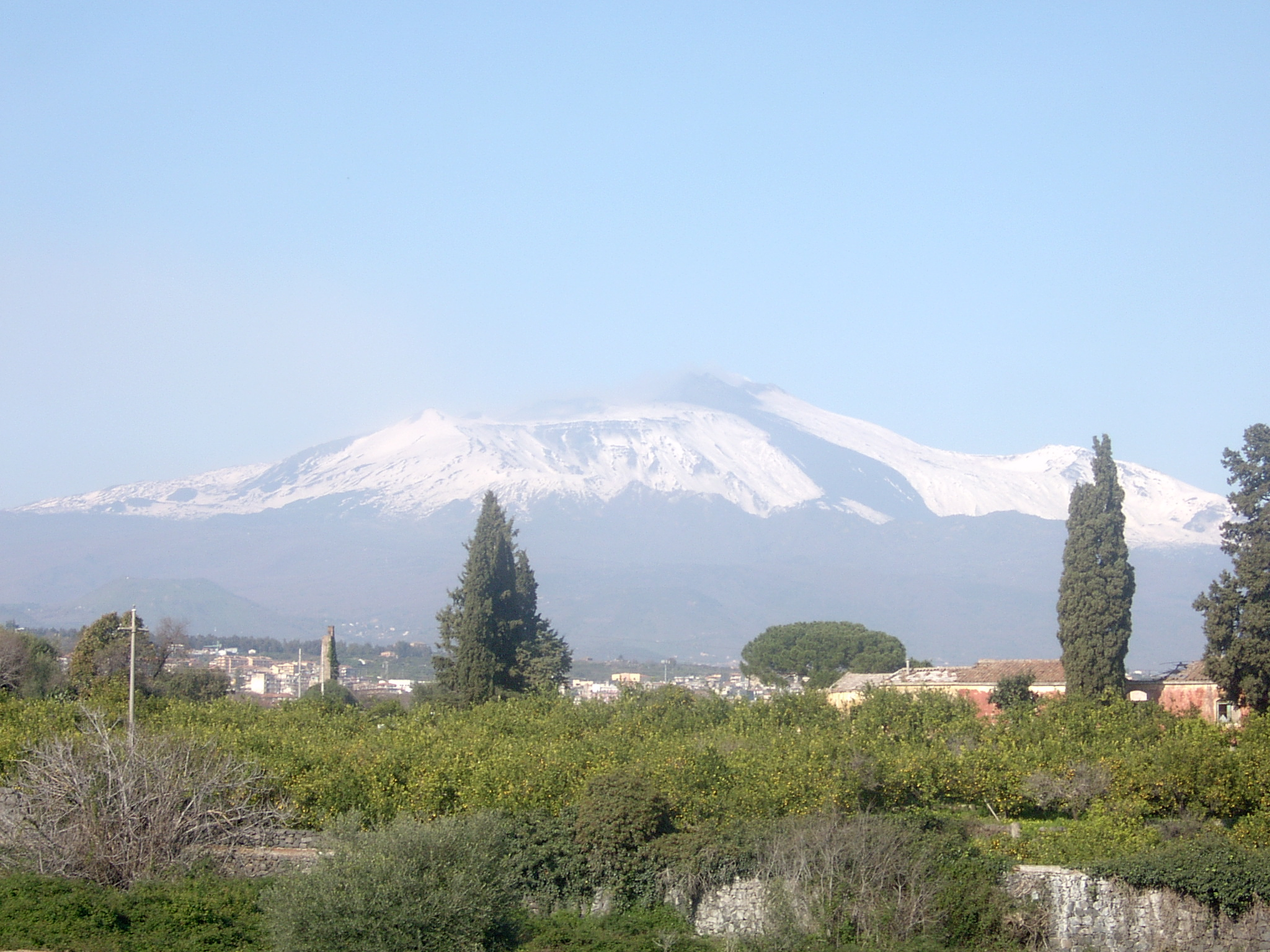 Volcano Etna seen from Acireale